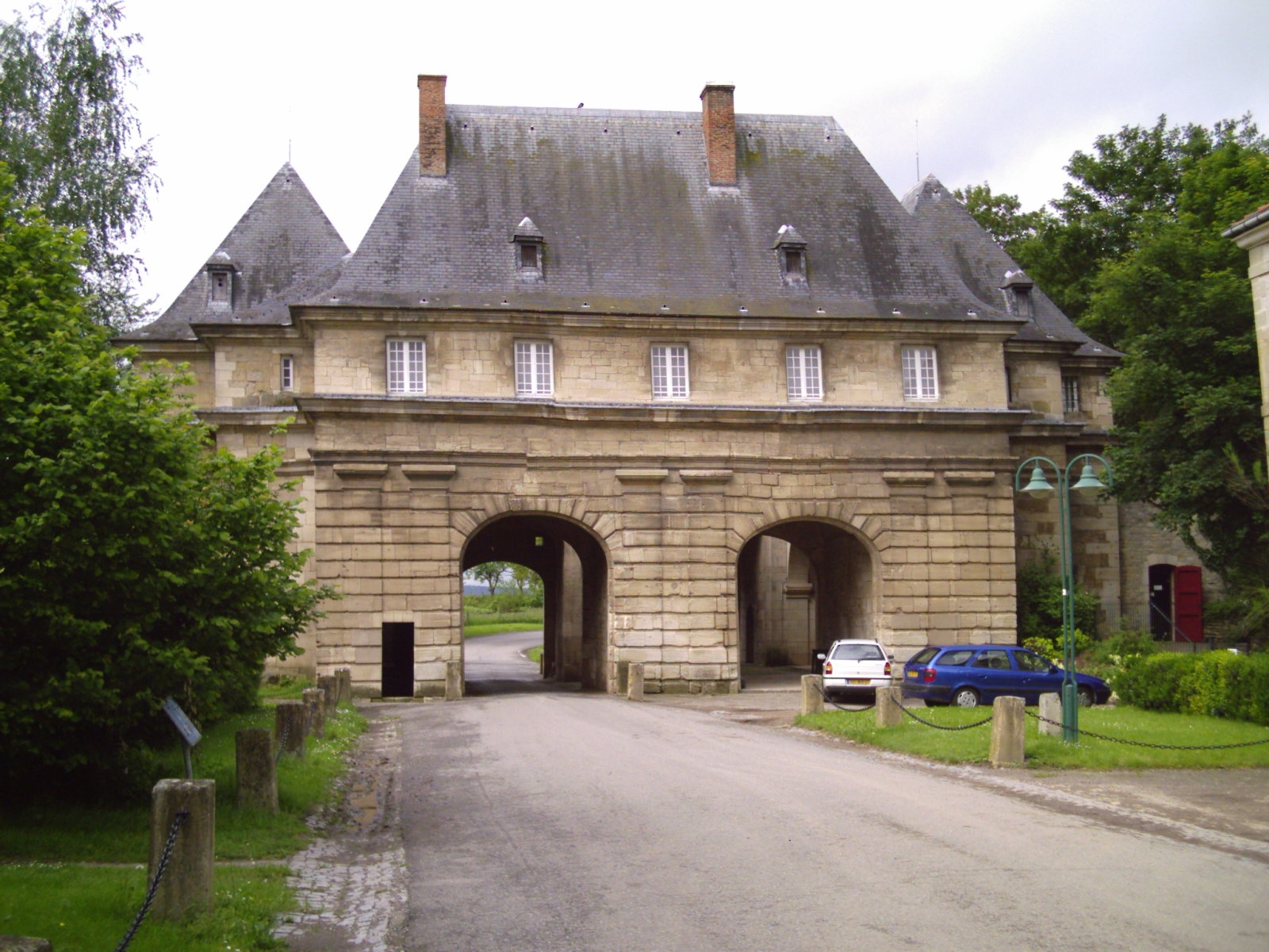 Marsal 57 France, Porte de France, vue interieur